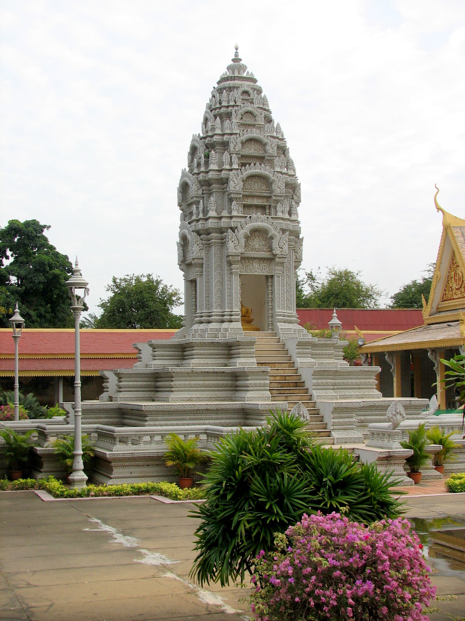 Royal Palace including gardens and tombs in pagoda, Phnom Penh Cambodia הארמון המלכותי שעיר פנום פן בירת קמבודיה. הארמון נמצא במתחם סגור הכולל מבנים רבים גנים ופגודות שהינם קברים של בני המשפחה המלכותית